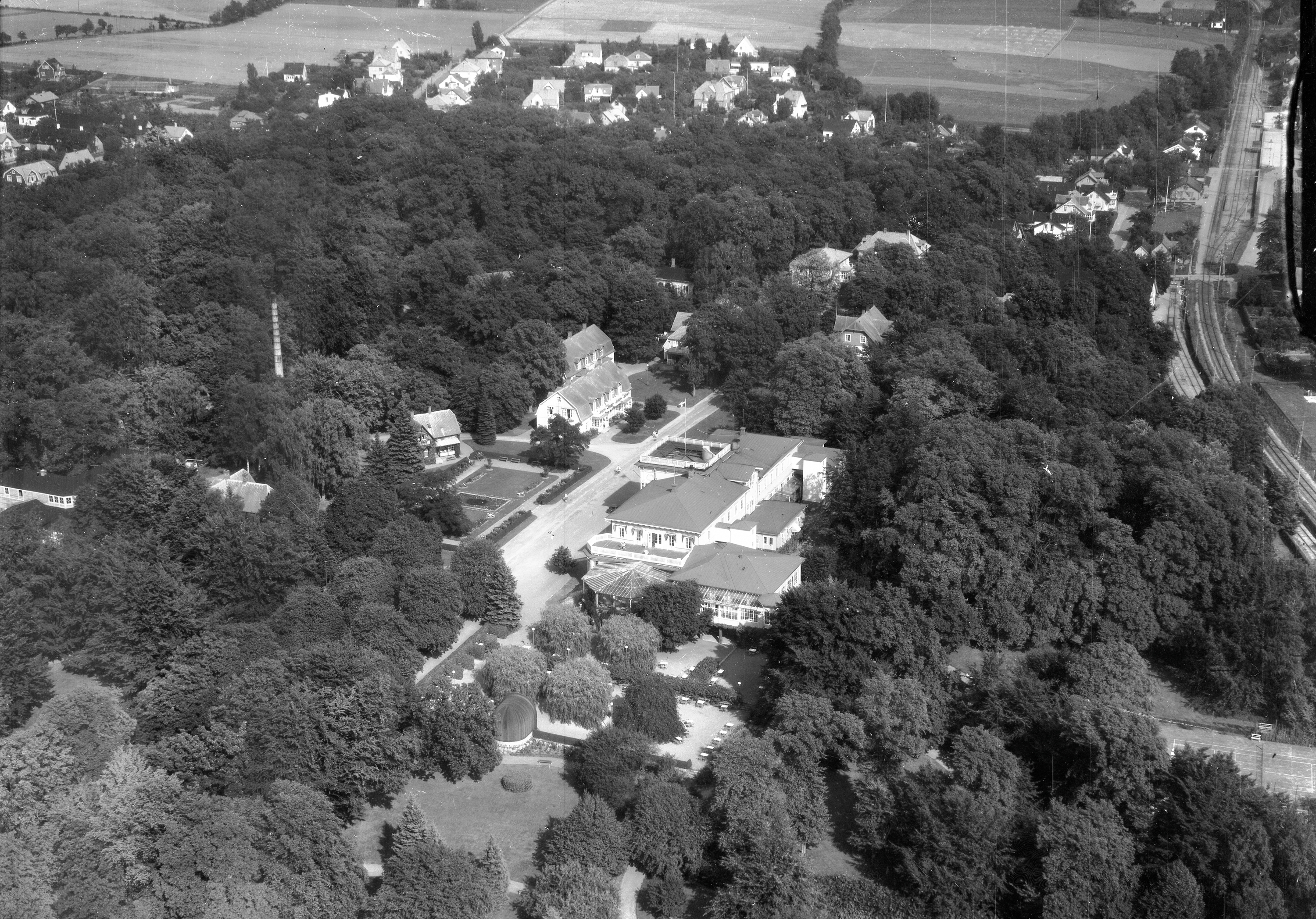 Flygfoto över Ramlösa brunn och station 1946.